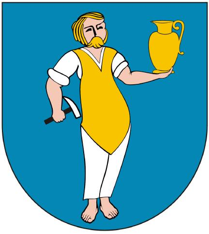 Nowy herb gminy Koszęcin / New coat of arms of gmina Koszęcin